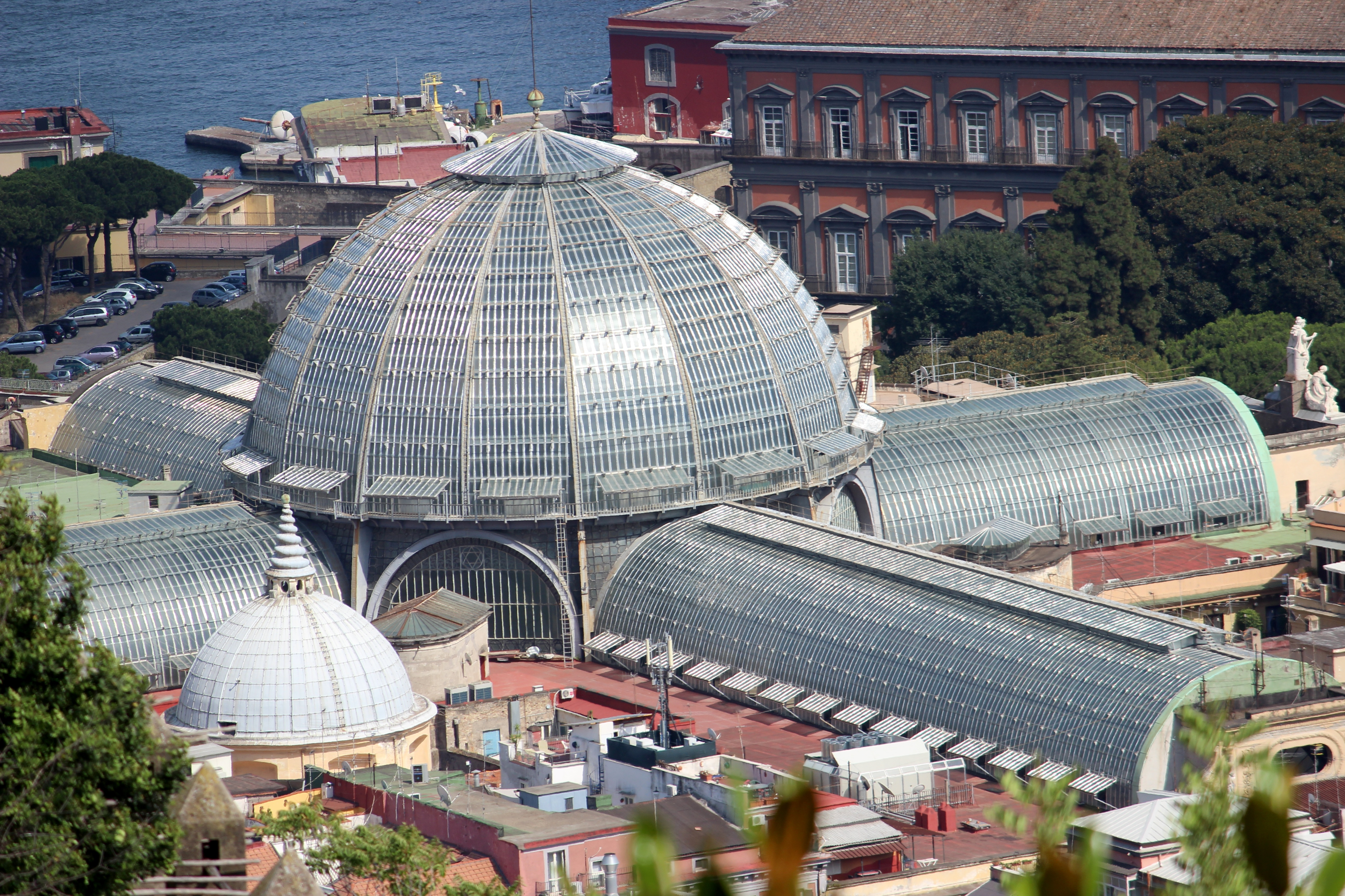 Nápoles, vista de la Galleria Umberto I desde la Certosa di San Martino.